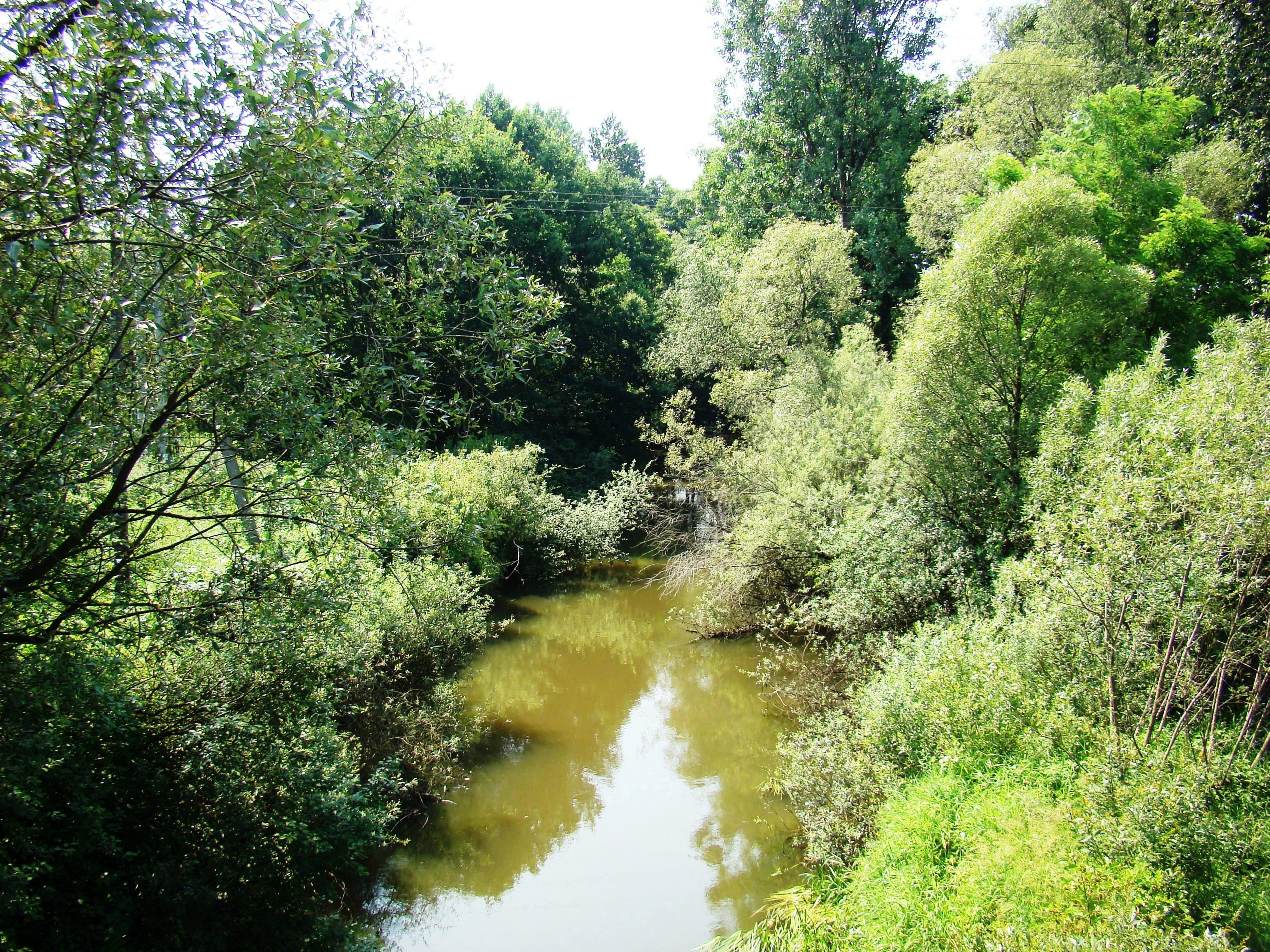 Rzeka Warta w Kolonii Borek